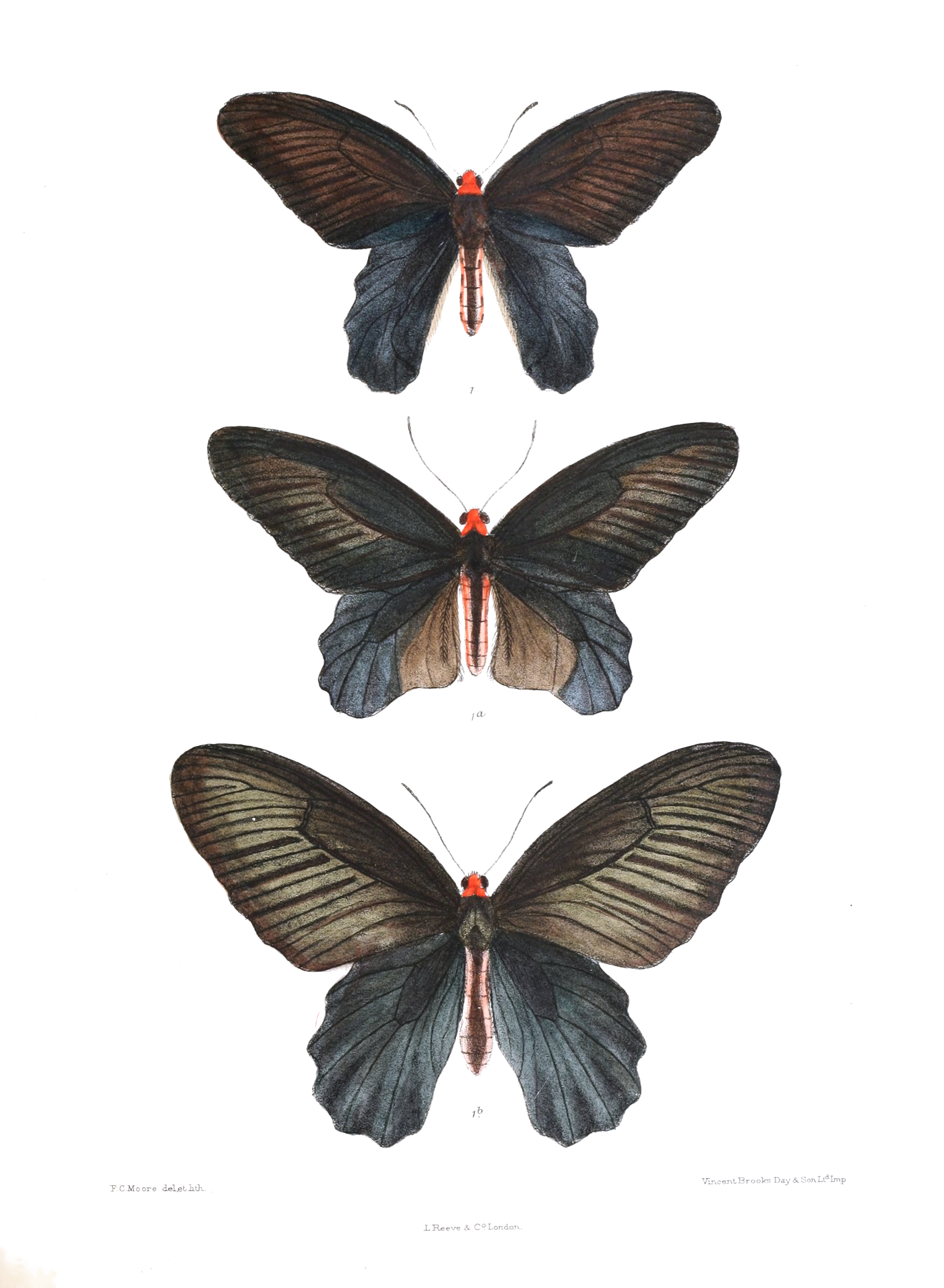 Atrophaneura varuna astorion